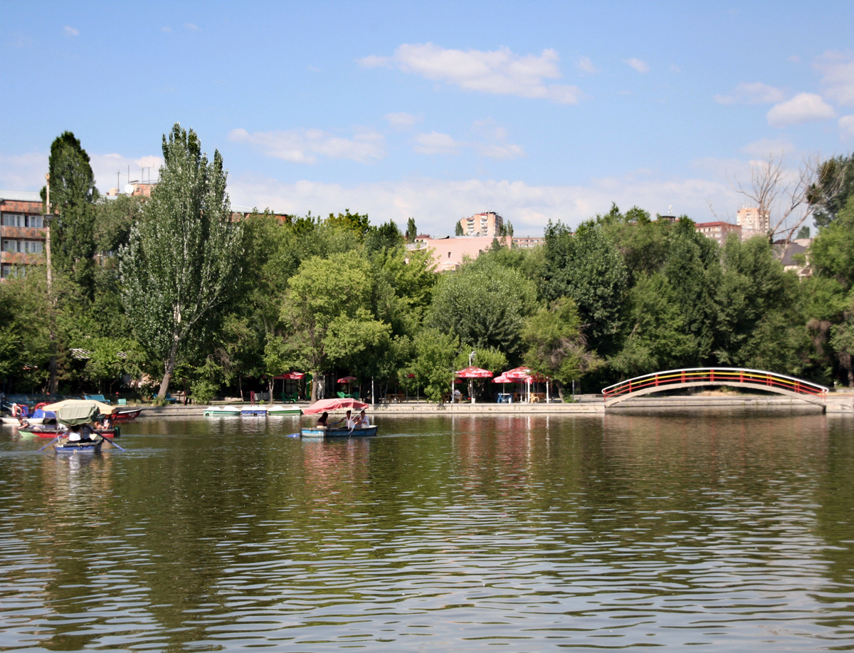 Parc de la Victoire à Erevan : étang et cafés